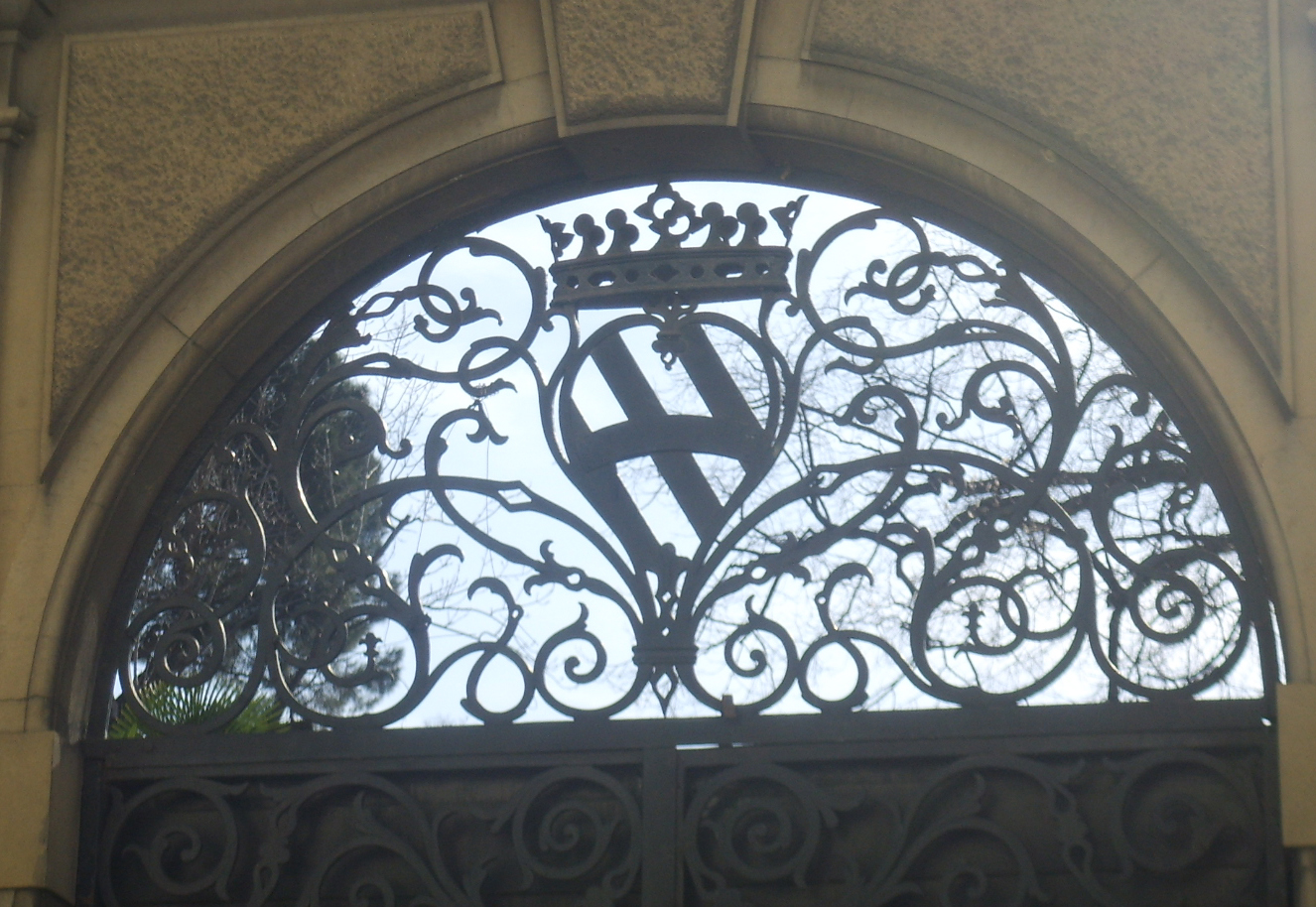 Stazione_Santa_Maria_Novella